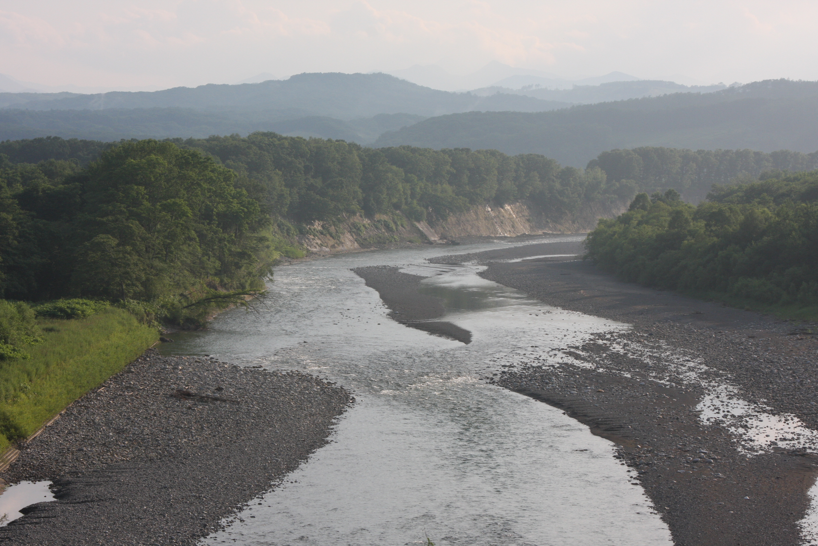 歴舟川（大樹町） 道道55号線より望見